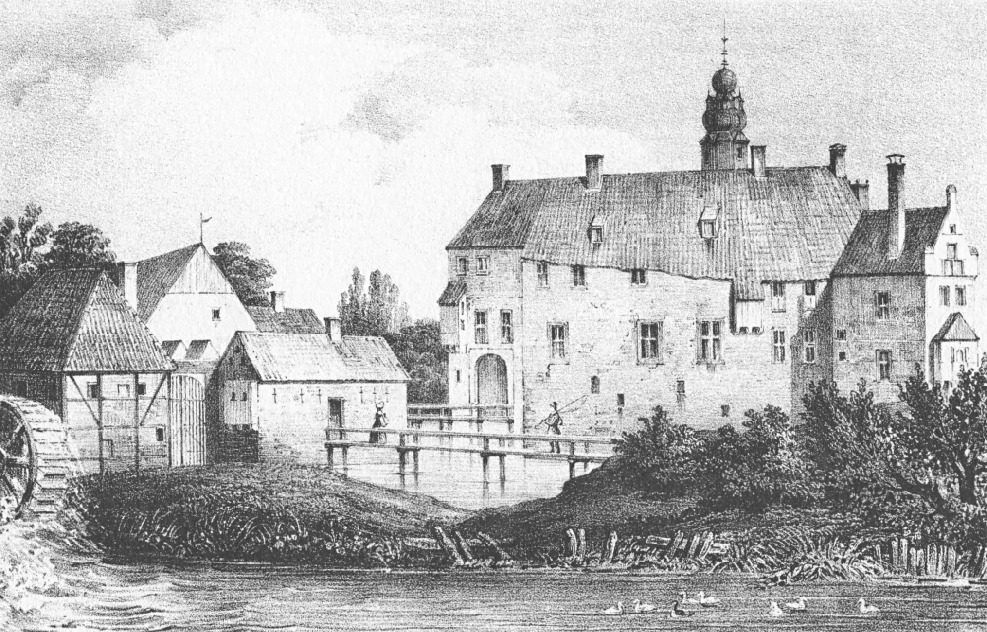 Südwest-Ansicht der Burg Vischering auf einer alten Lithografie